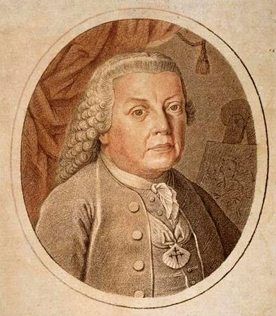 pintor da corte